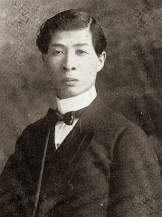 1918年（大正7年・27歳）の宮地志行